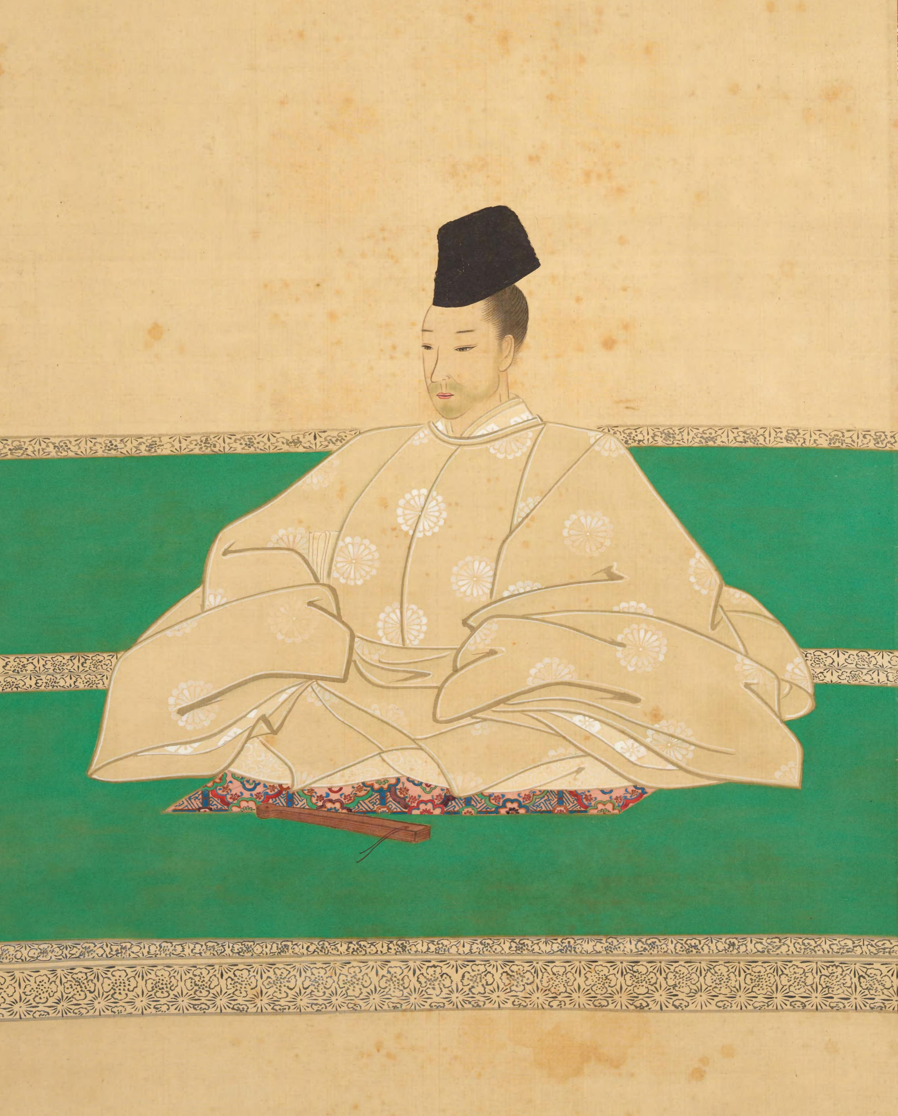 閑院宮孝仁親王の肖像。